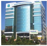 Sobhanbag Campus,Dhaka